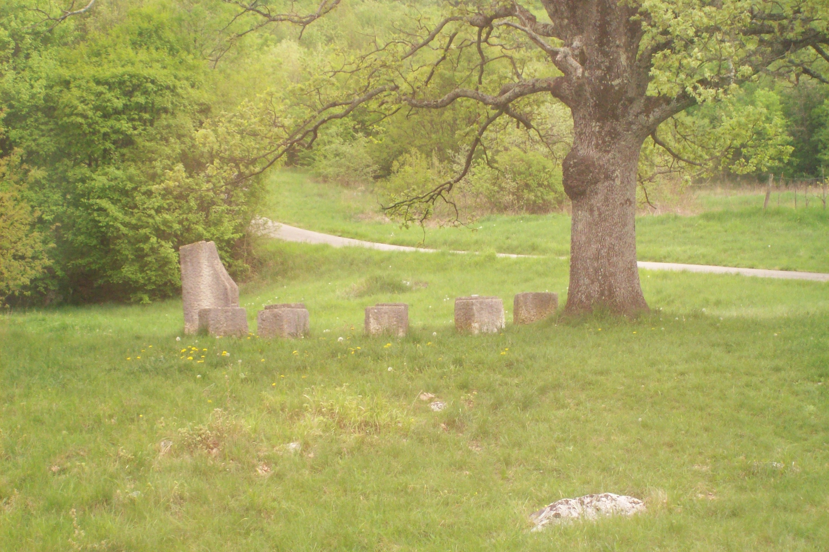 Sijelo Klimenta Ohridskog, Aleja glagoljaša, Istra, Hrvatska